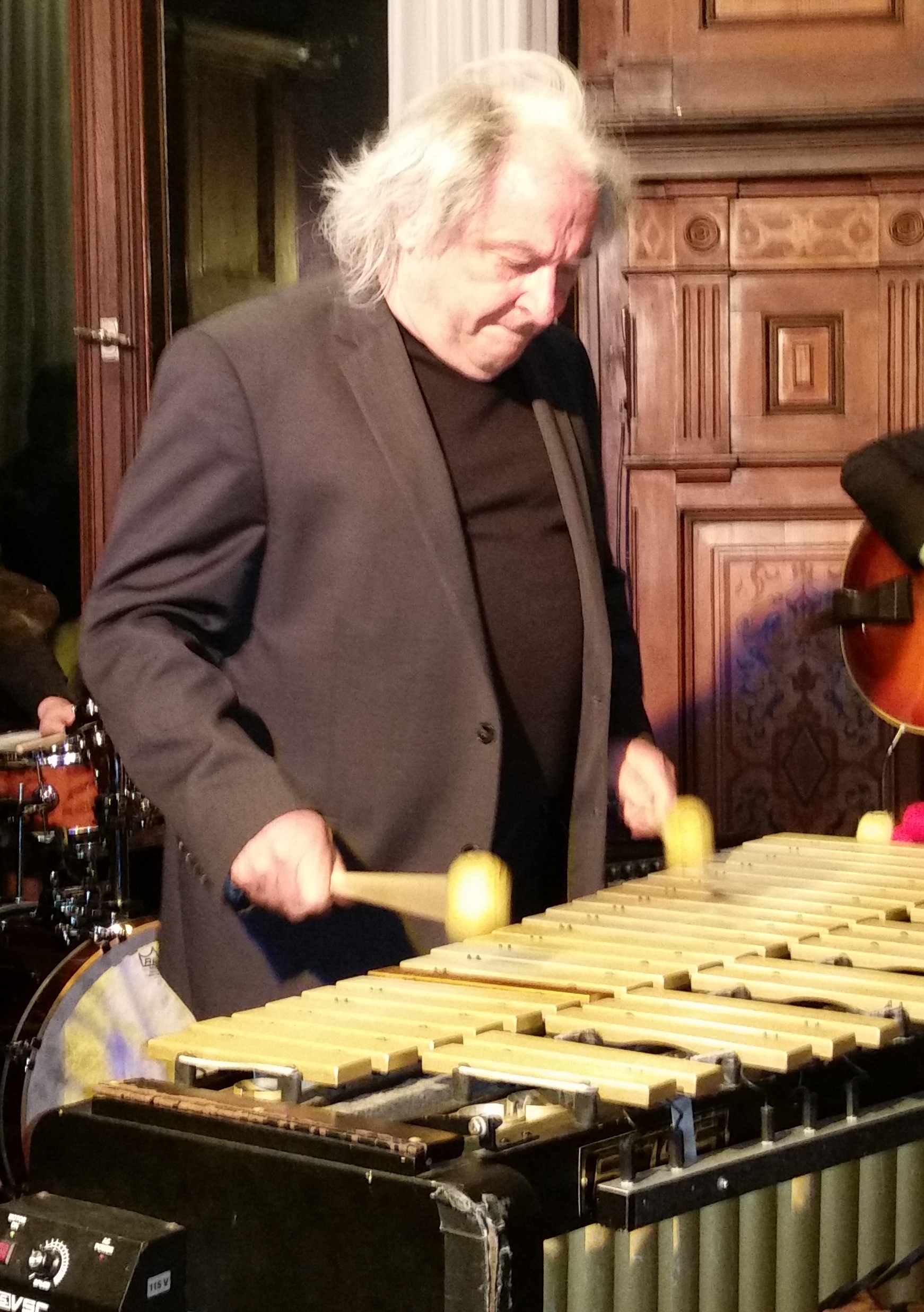 Der deutsche Jazzmusiker Dizzy Krisch